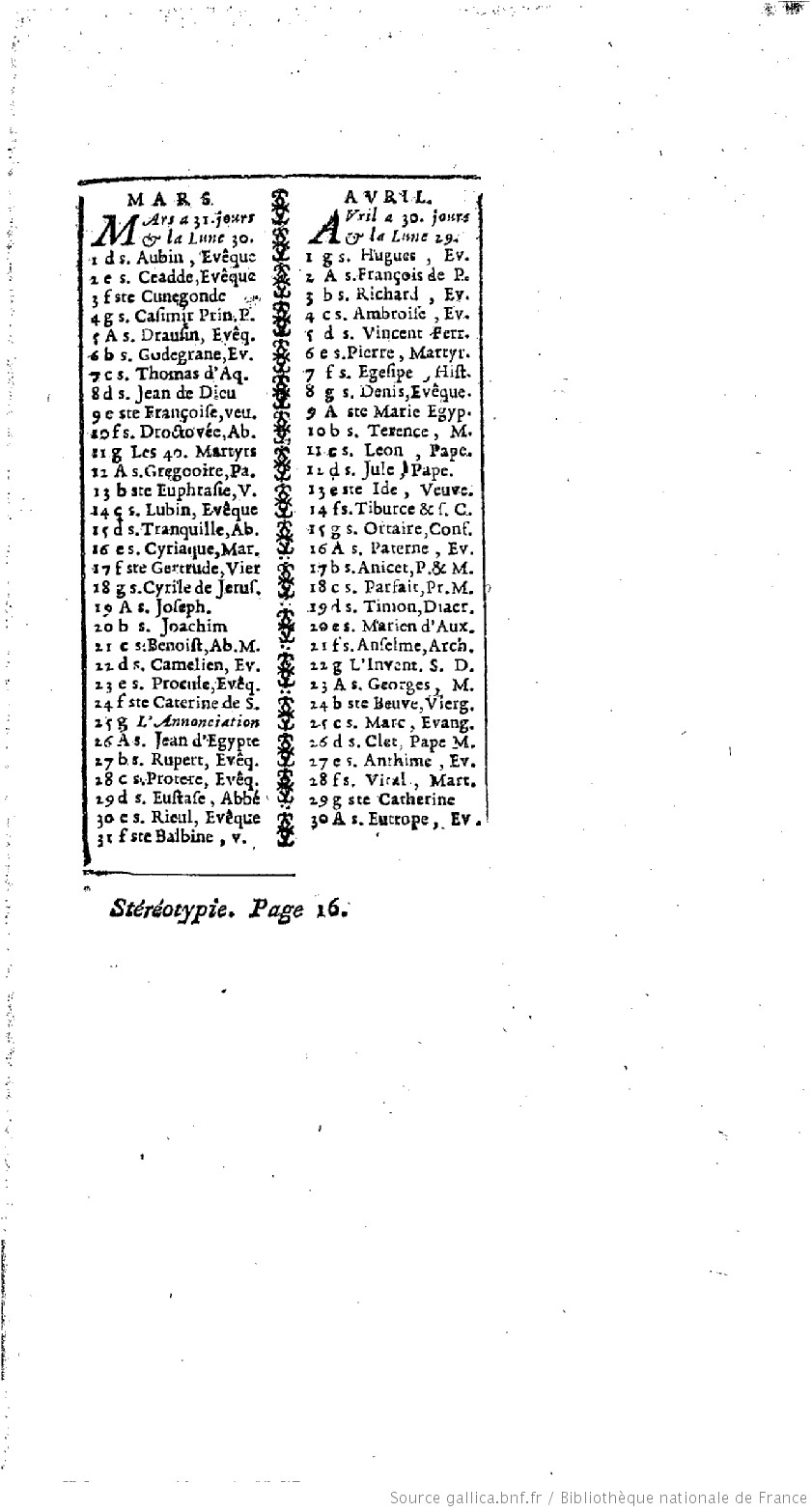 Pagina stereotipa da un libro d'ore francese del Settecento, forse edito da Valleyre, riprodotta da Armand Gaston Camus nella sua Histoire de la stereotypie